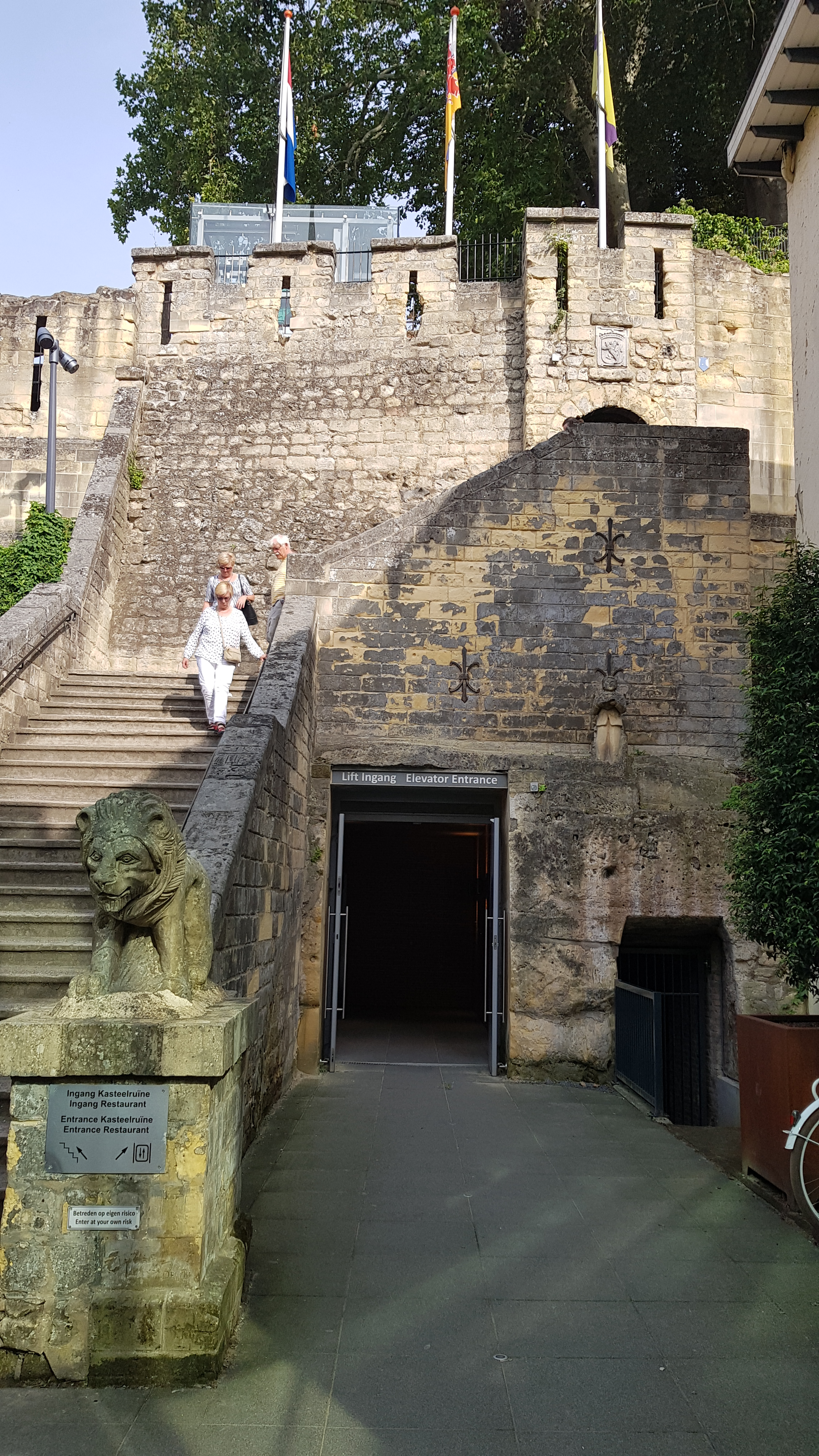 Kasteelgroeve, Valkenburg, Nederland